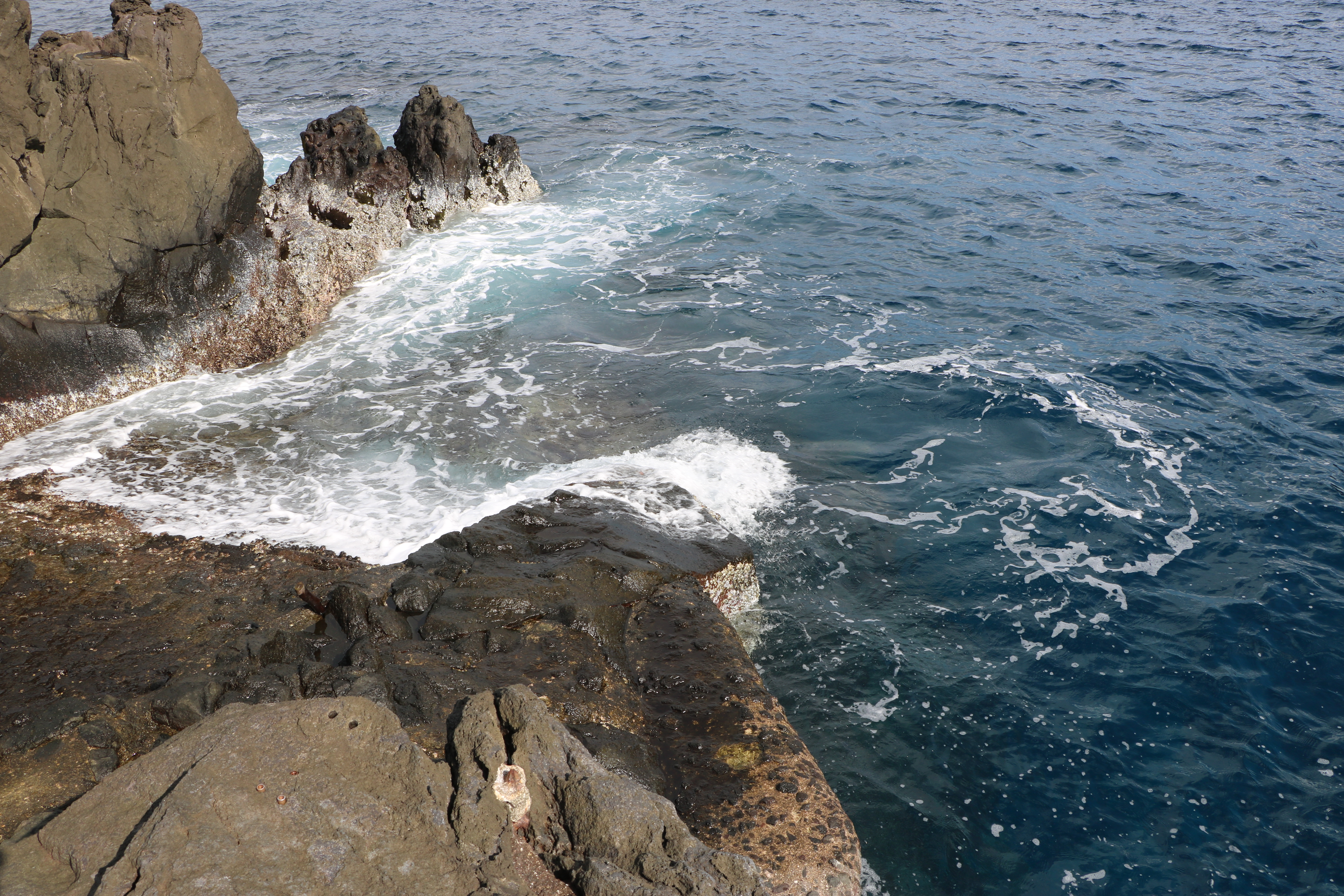 八丈小島鳥打地区船着き場（東京都八丈町）